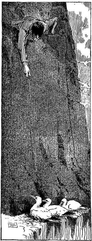 Capturing gannets